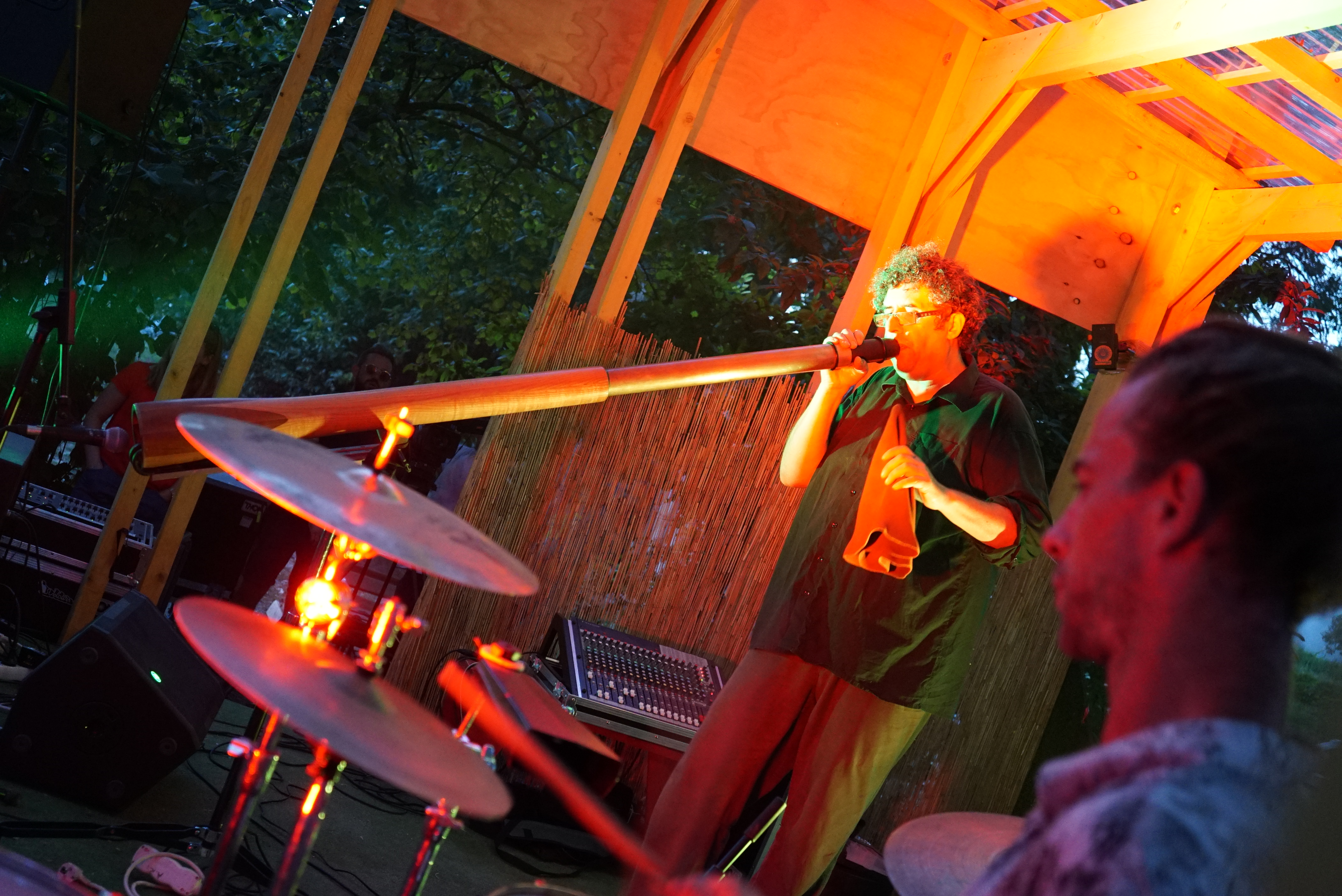 en session à la Guinguette.